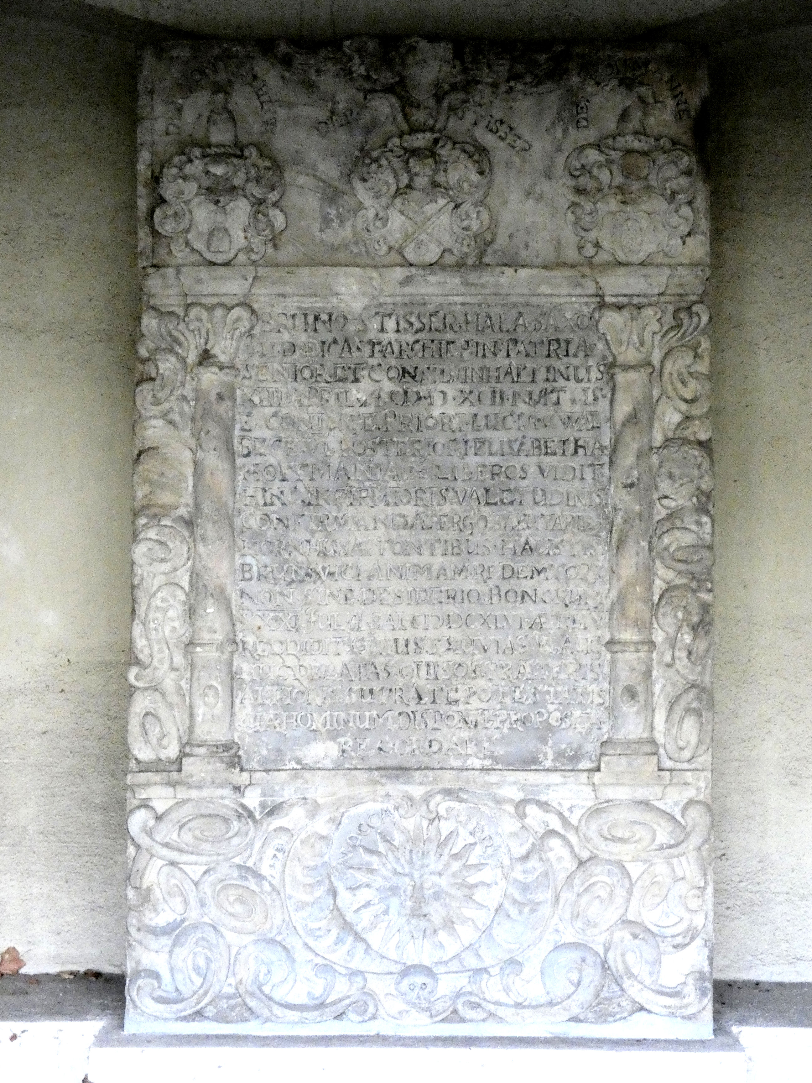 Epitaph für Bruno Stisser von 1646, Stadtgottesacker Halle, Gruftbogen 65